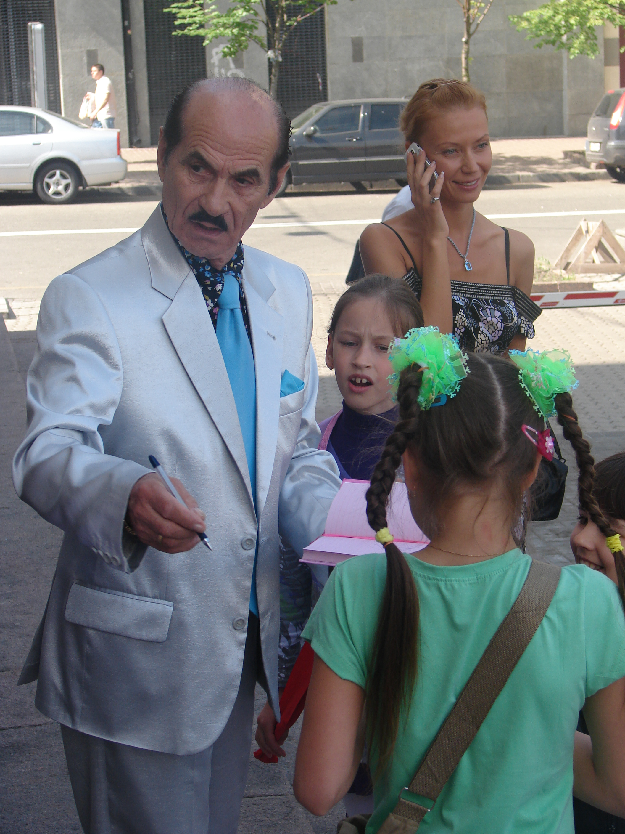 Чапкіс Григорій Миколайович роздає автографи учасникам фестивалю «Містерія танцю»: фото